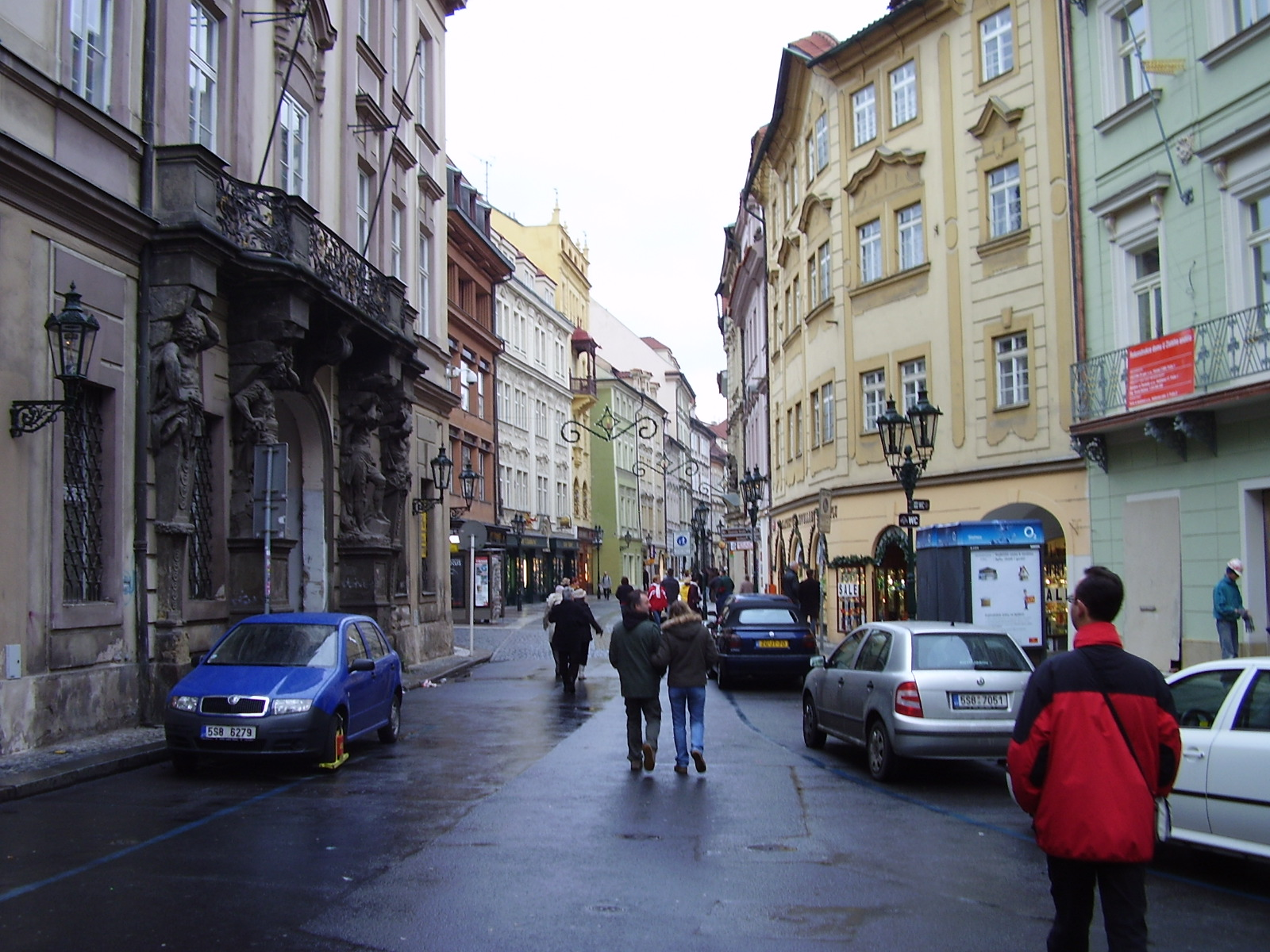 Celetná - Prague november 2006